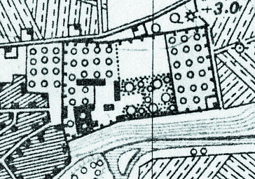 фрагмент мапи міста.